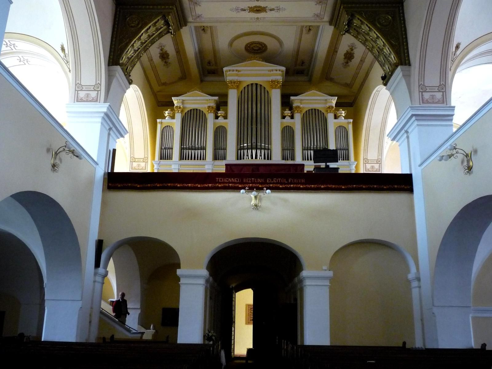 A sárospataki református templom orgonája